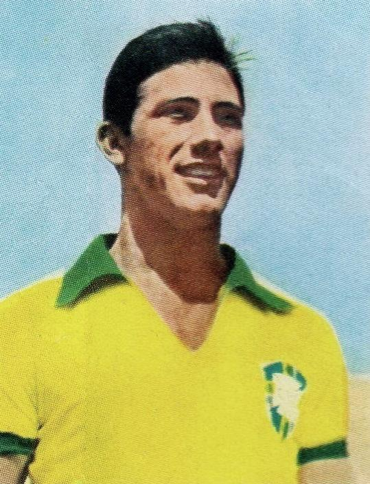 Hilderaldo Luís Bellini en 1966 - CALCIATORI EPOCA MONDIALI 1966